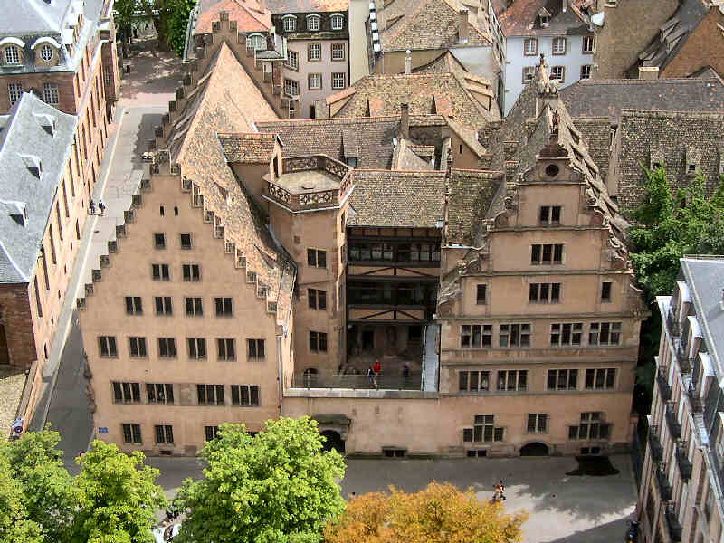 Le Bâtiment de l’œuvre Notre-Dame à Strasbourg